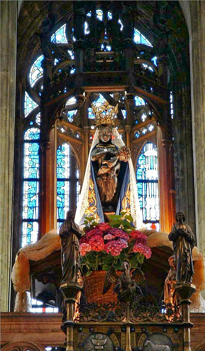 Zwarte Madonna van Halle; Sint-Martinusbasiliek, Halle, België